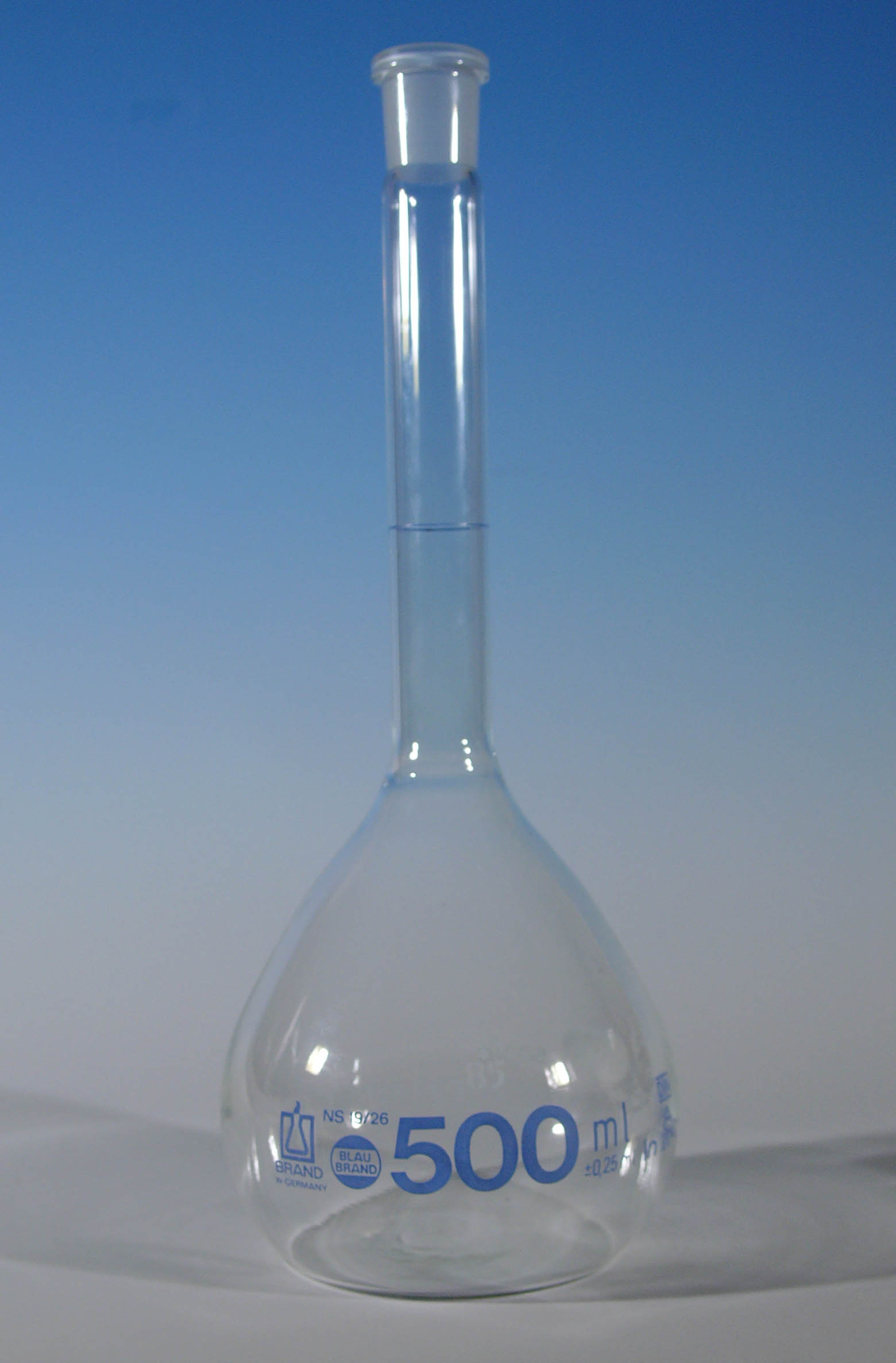 Volumetric flask